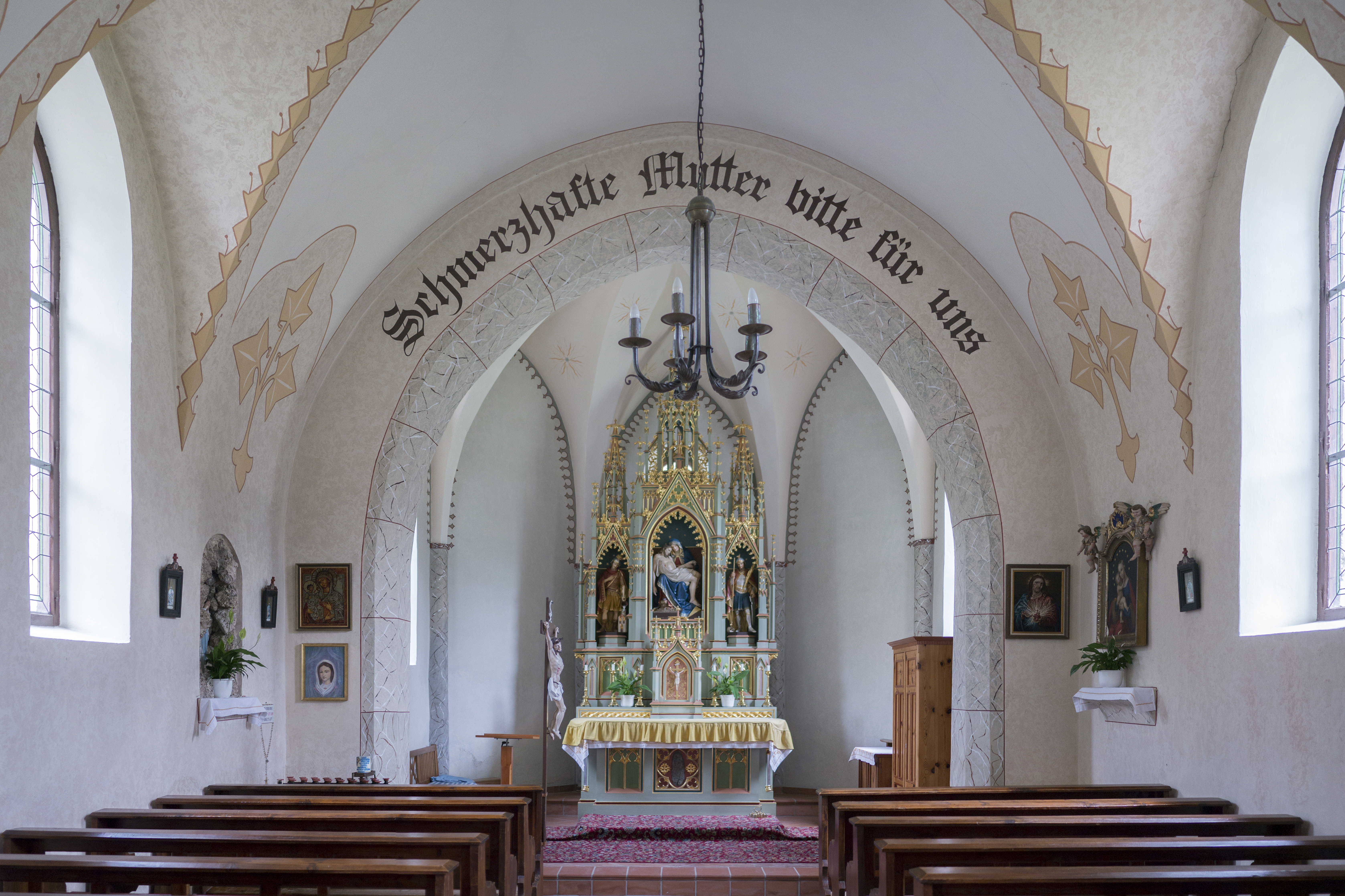 Kapelle Zur schmerzhaften Muttergottes Mater dolorosa. Inklusive Herz Jesu und Lourdes-Nische